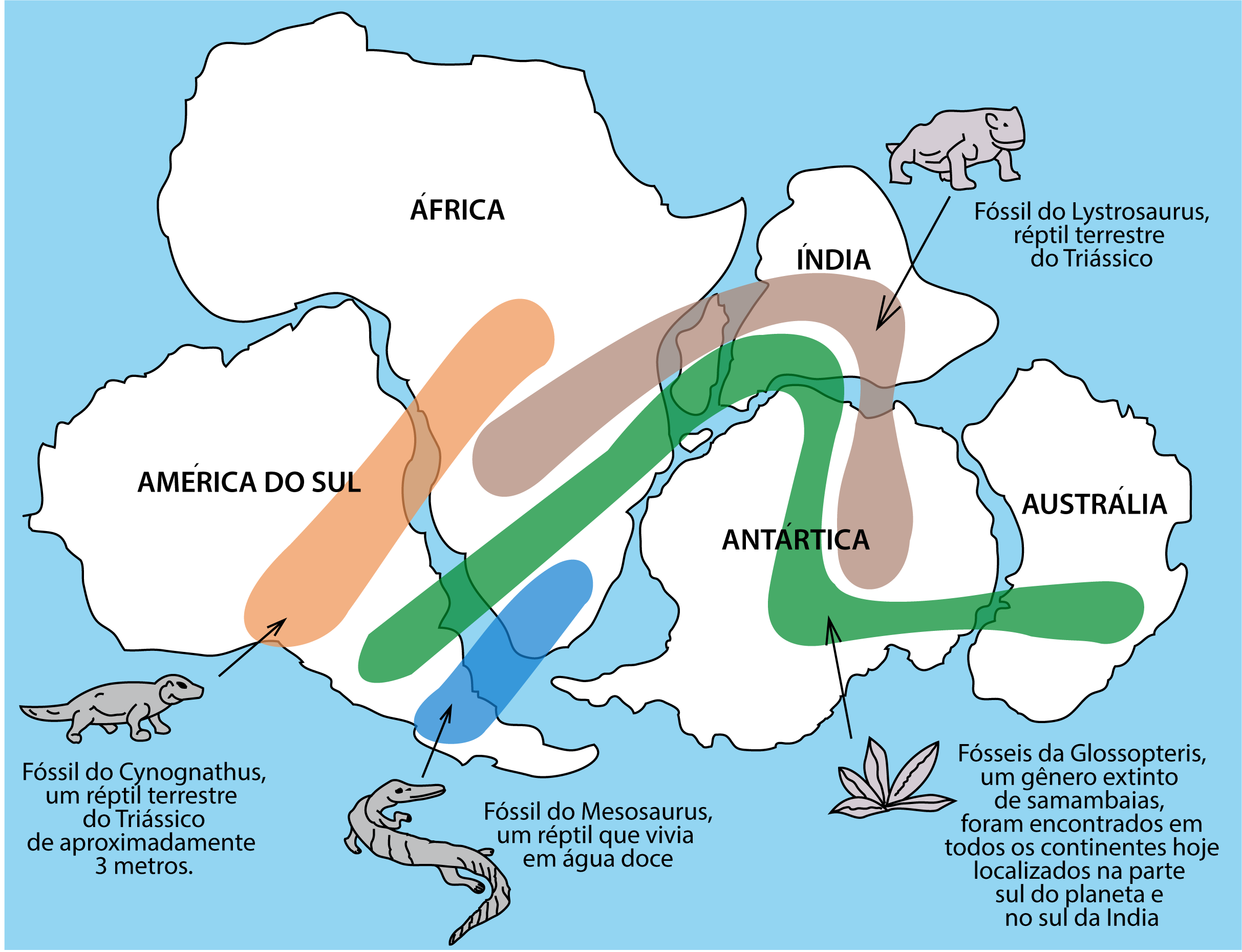 A distribuição de fósseis de plantas e animais evidenciou que os continentes tinham que ter estado unidos durante o período em que estes seres existiram.